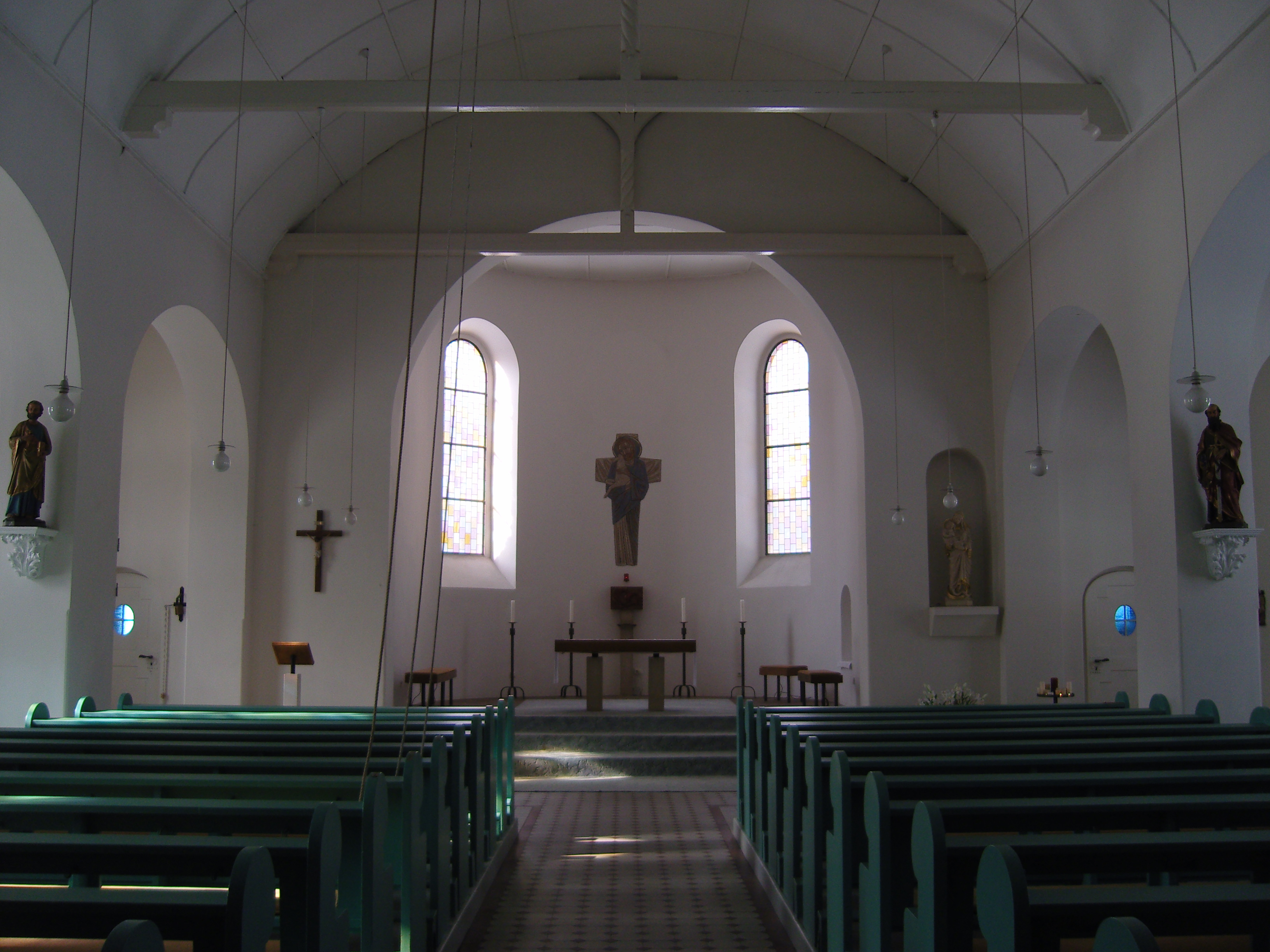 Innenraum der Herz-Jesu-Kirche in Klettwitz; Blick auf den Altar